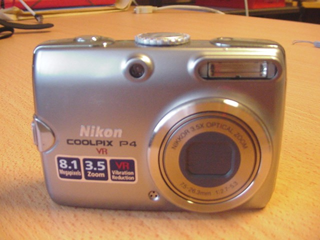 Appareil photographique numérique Nikon Coolpix P4